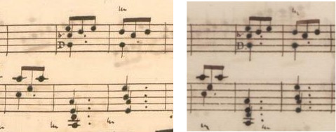 Un détail de la sonate K. 487 dans les manuscrits de Venise (XII 4) et Parme (XIV 4), montrant le trille sur le do et non un mordant sur le mi, comme le reproduisent quasi toutes les éditions, sauf celle de Kenneth Gilbert qui est le seul conforme aux sources.